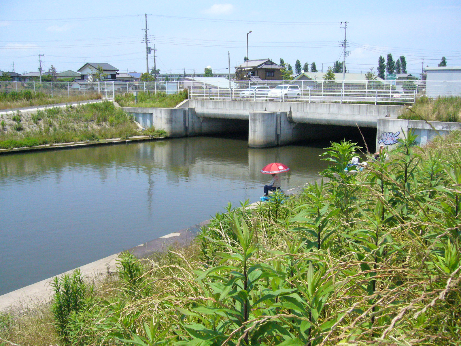 drainage-canal-onogawa-river,katori-city,japan